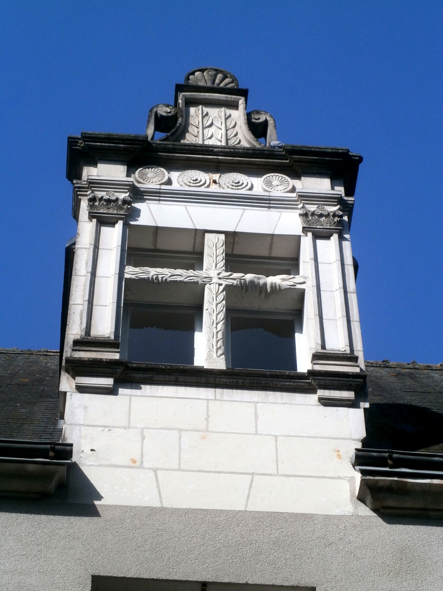 Lucarne et fenêtre à menaux de la mairie de Montrésor.